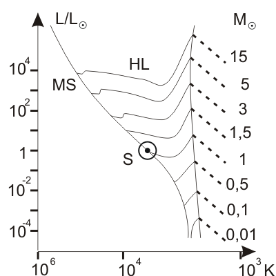 L/L Cường độ sáng, tính theo đơn vị cường độ sáng Mặt Trời; S Mặt Trời; K Nhiệt độ bề mặt (K); HL Các đường Hayashi; MS dãy chính, nơi bắt đầu phản ứng nhiệt hạch trong các sao mới; M Khối lượng Mặt Trời. Englisht: L/L Luminosity (solar units); S Sun; K Surface temperature (K); HL Hayashi tracks; MS Main sequence, hydrogen fusion begins; M Solar mass.